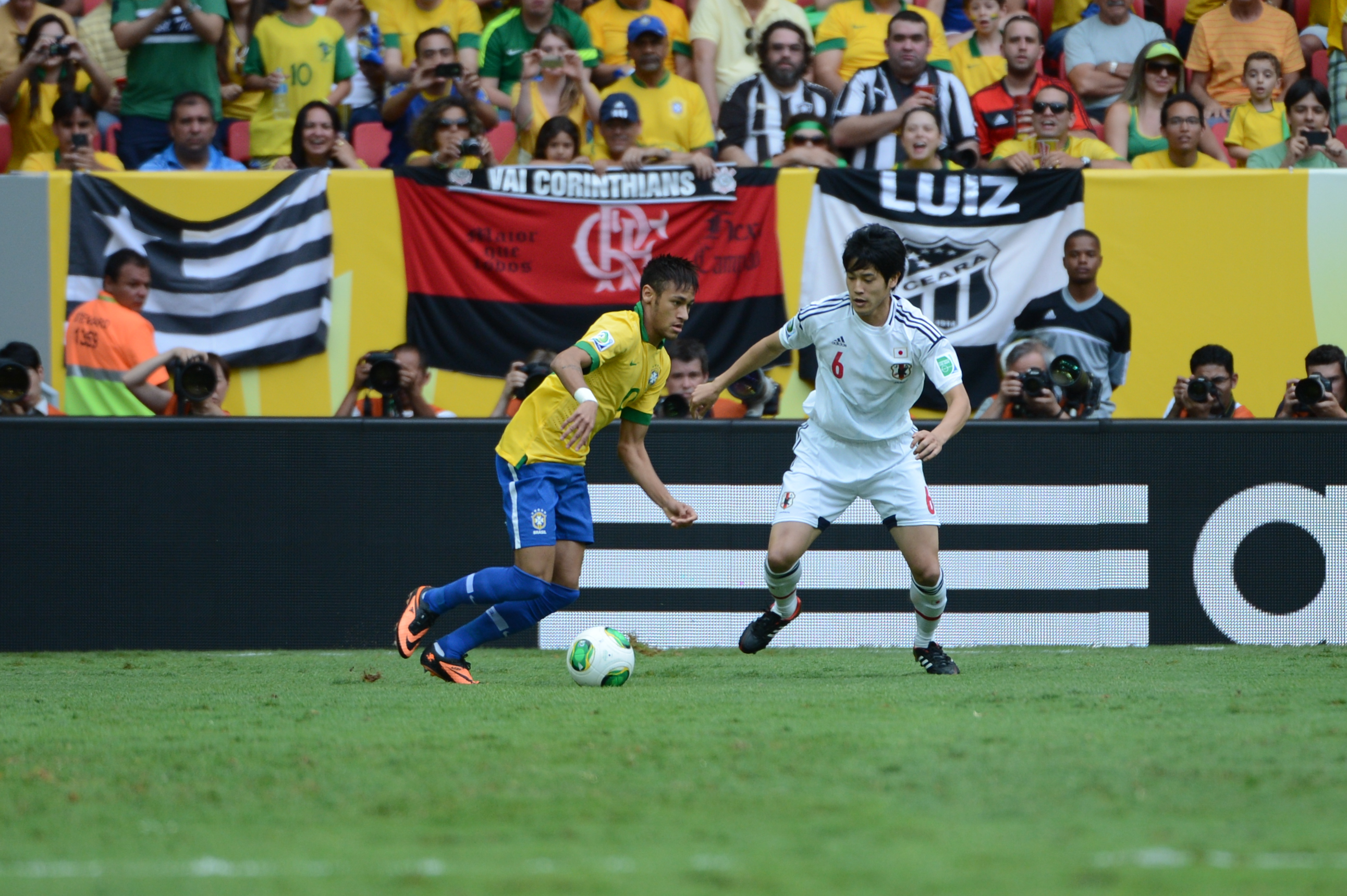 Jogo entre Brasil e Japão abre a Copa das Confederações